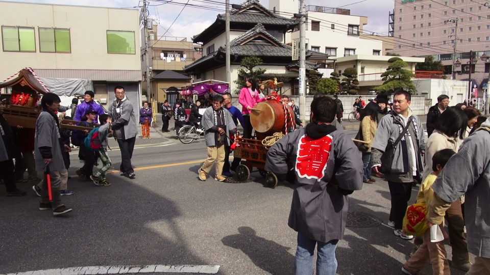 Anbasama